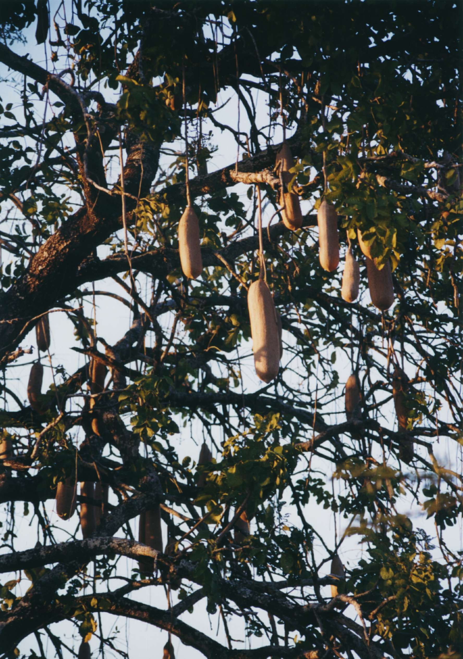 Kigelia africana fruits.